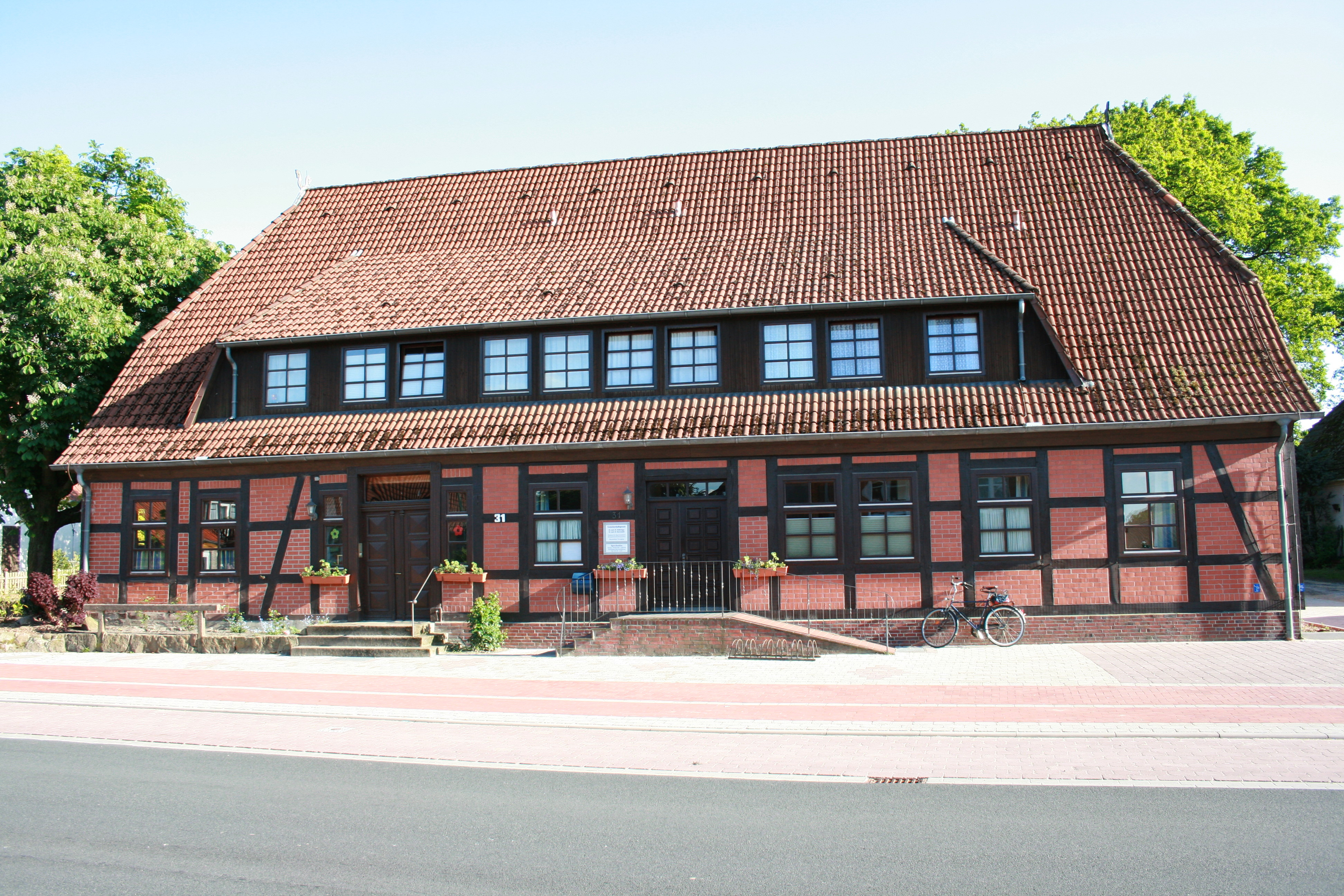 Hauptstraße in Neuenkirchen (Lüneburger Heide)